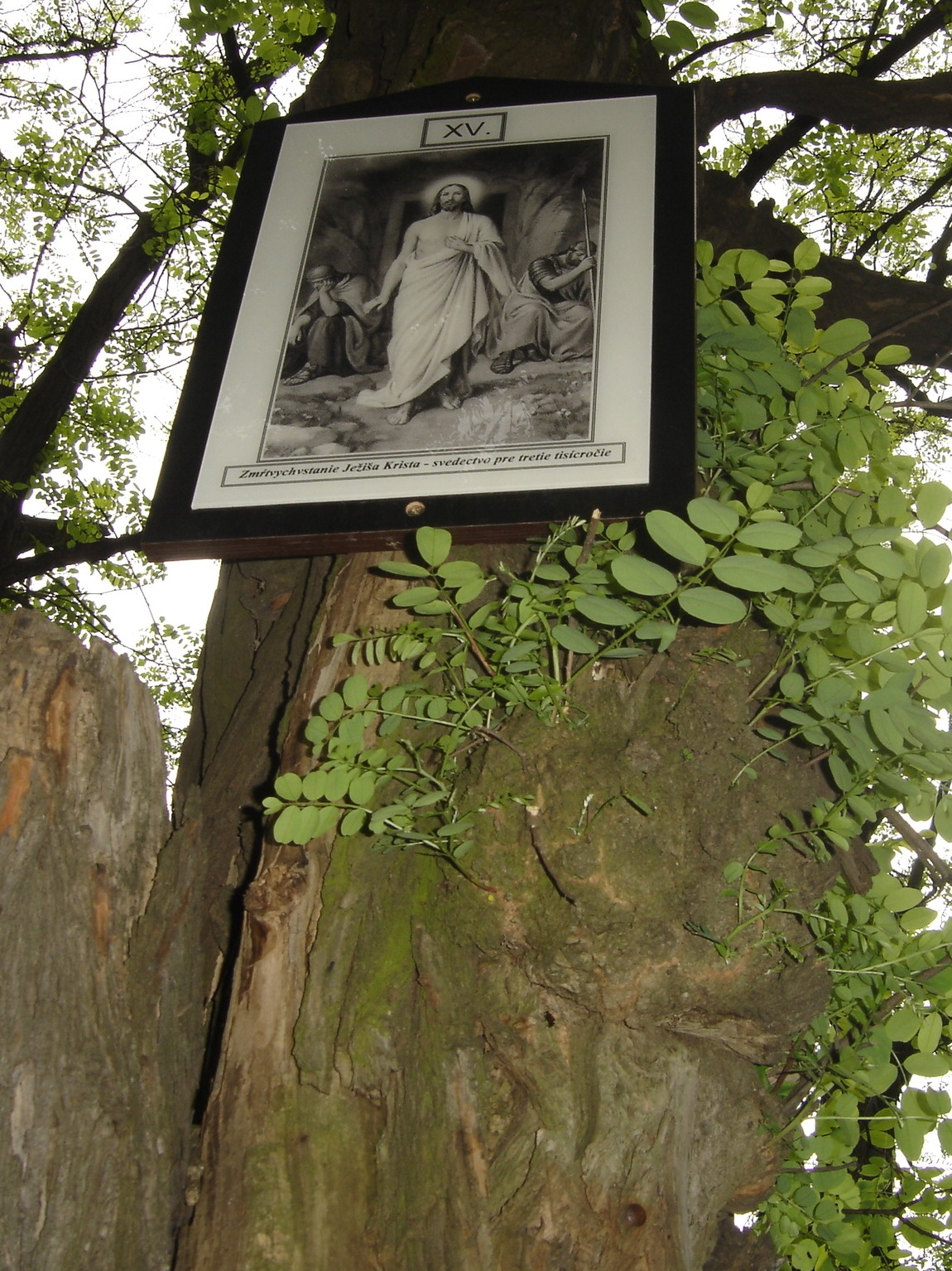 Bratislavská Kalvária